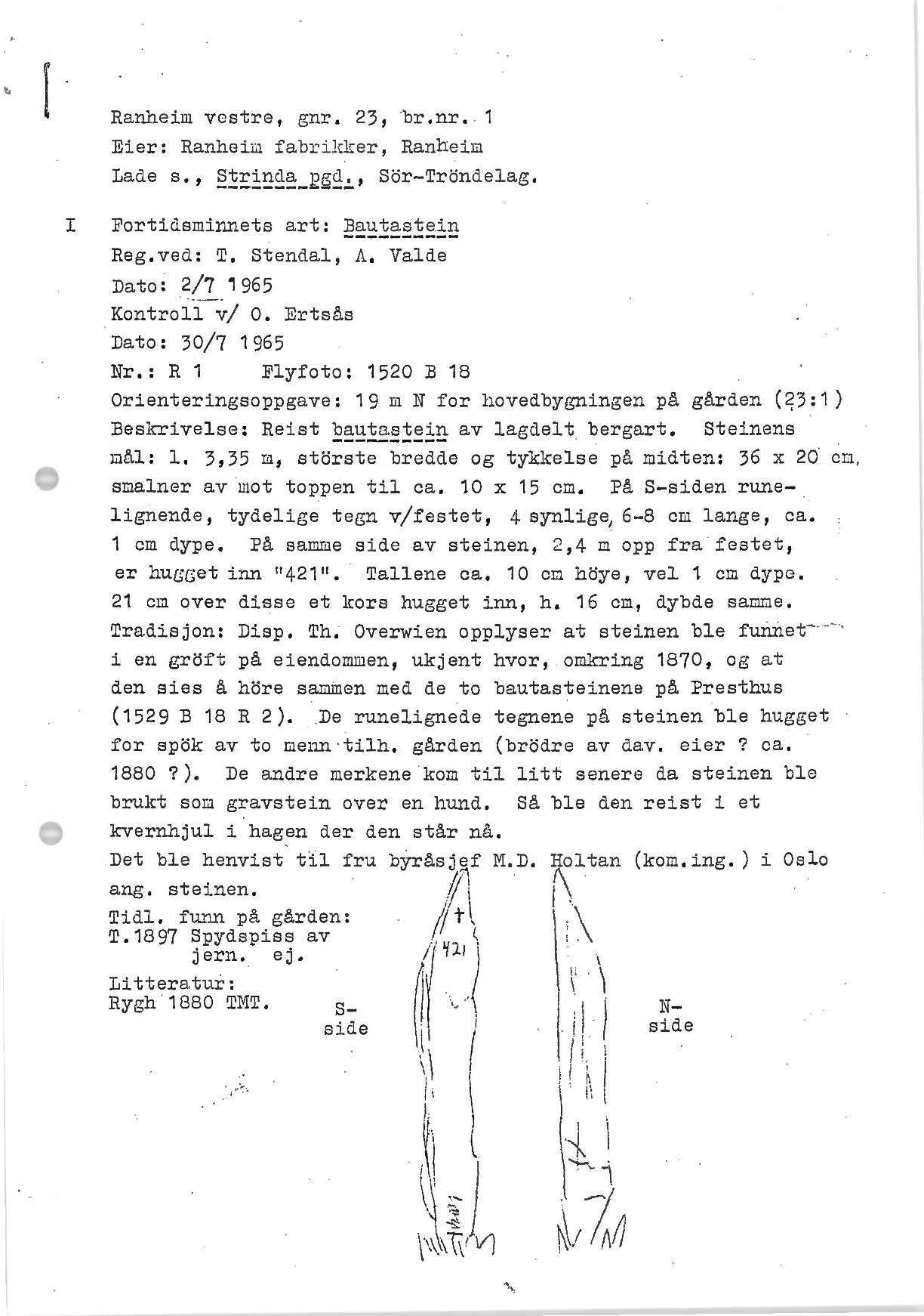 Format: Dokument Dato / Date: 2 Juli 1965 Sted / Place: Ranheim vestre, gnr. 23 bnr. 1 Wikipedia: Bautastein Wikipedia: Veet på Ranheim Eier / Owner Institution: Trondheim byarkiv, The Municipal Archives of Trondheim Arkivreferanse / Archive reference: Ranheim Papirfabrikk: Saksarkiv - Fredede fortidsminner (1966 - 1984) Ranheim vestre, gnr. 23, br.nr. 1 Eier: Ranheim fabrikker, Ranheim Lade s., Strinda pgd., Sør-Trøndelag. I. Fortidsminnets art: Bautastein Reg.ved: T. Steindal, A. Valde Dato: 2/7 1965 Kontroll v/ O. Ertsås Dato: 30/7 1965 Nr. R 1 Flyfoto: 1520 B 18 Orienteringsoppgave: 19 m N for hovedbygningen på gården (23:1) Beskrivelse: Reist bautastein av lagdelt bergart. Steinens mål: 1. 3,35 m, største bredde og tykkelse på midten: 36 X 20 cm, smalner av mot toppen til ca. 10 X 15 cm. På S-siden runelignende, tydelige tegn v/ festet, 4 synlige, 6-8 cm lange, ca. 1 cm. dype. På samme side av steinen, 2,4 m opp fra festet, er hugget inn "421". Tallene ca. 10 cm høye, vel 1 cm dype. 21 cm. over disse et kors hugget inn, h. 16 cm, dybde samme. Tradisjon: Disp. Th. Overwien opplyser at steinen ble funnet i en grøft på eiendommen, ukjent hvor, omkring 1870, og at den sies å høre sammen med de to bautasteinene på Presthus (1529 B 18 R 2). De runelignende tegnene på steinen ble hugget for spøk av to menn tilh. gården (brødre av dav. eier ? ca. 1880 ?). De andre merkene kom til litt senere da steinen ble brukt som gravstein over en hund. Så ble den reist i et kvernhjul i hagen der den står nå. Det ble henvist til fru byråsjef M.D. Holtan (kom.ing.) i Oslo ang. steinen. Tidl. funn på gården: T. 1897 Spydspiss av jern. ej. Litteratur: Rygh 1880 TMT